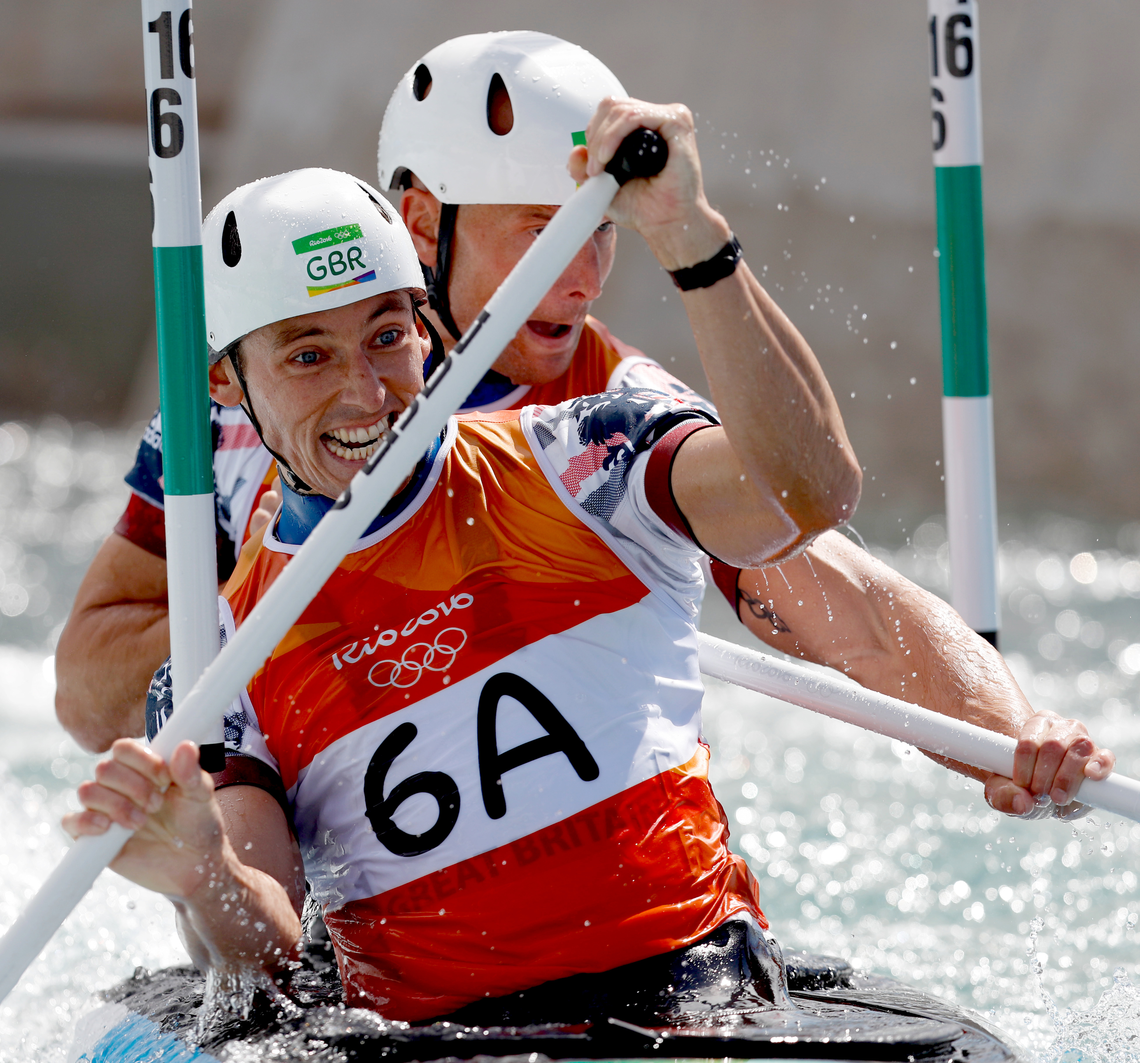 Rio de Janeiro - Britânicos David Florence e Richard Hounslow levam medalha de prata na canoagem slalom categoria C2 nos Jogos Olímpicos Rio 2016 no X Park em Deodoro (Fernando Frazão/Agência Brasil))